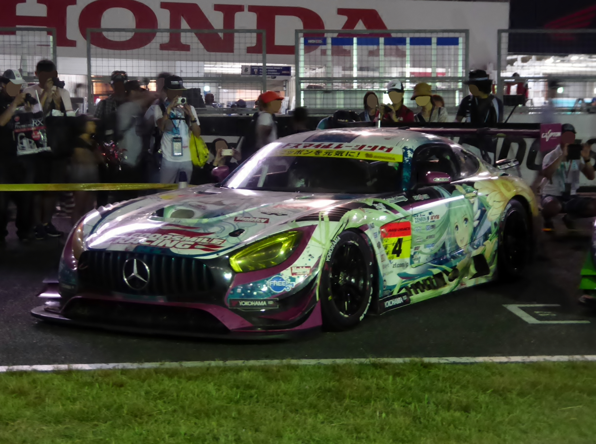 2017年鈴鹿1000㎞終了後の4号車グッドスマイル初音ミクAMGを撮影。